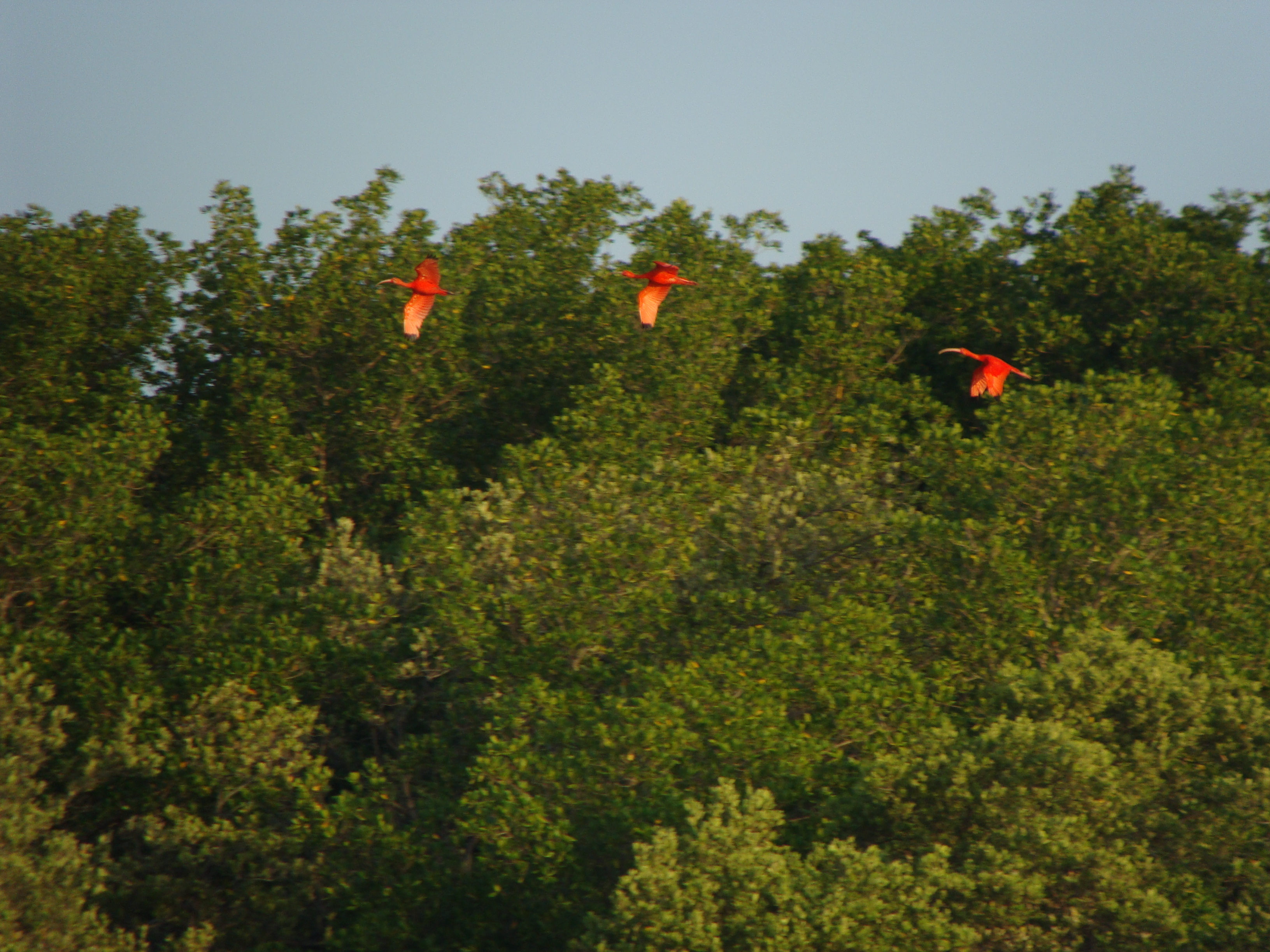 Ao entardecer, guarás retornando para o seu local de repouso - Delta do Parnaíba (lado Maranhão)